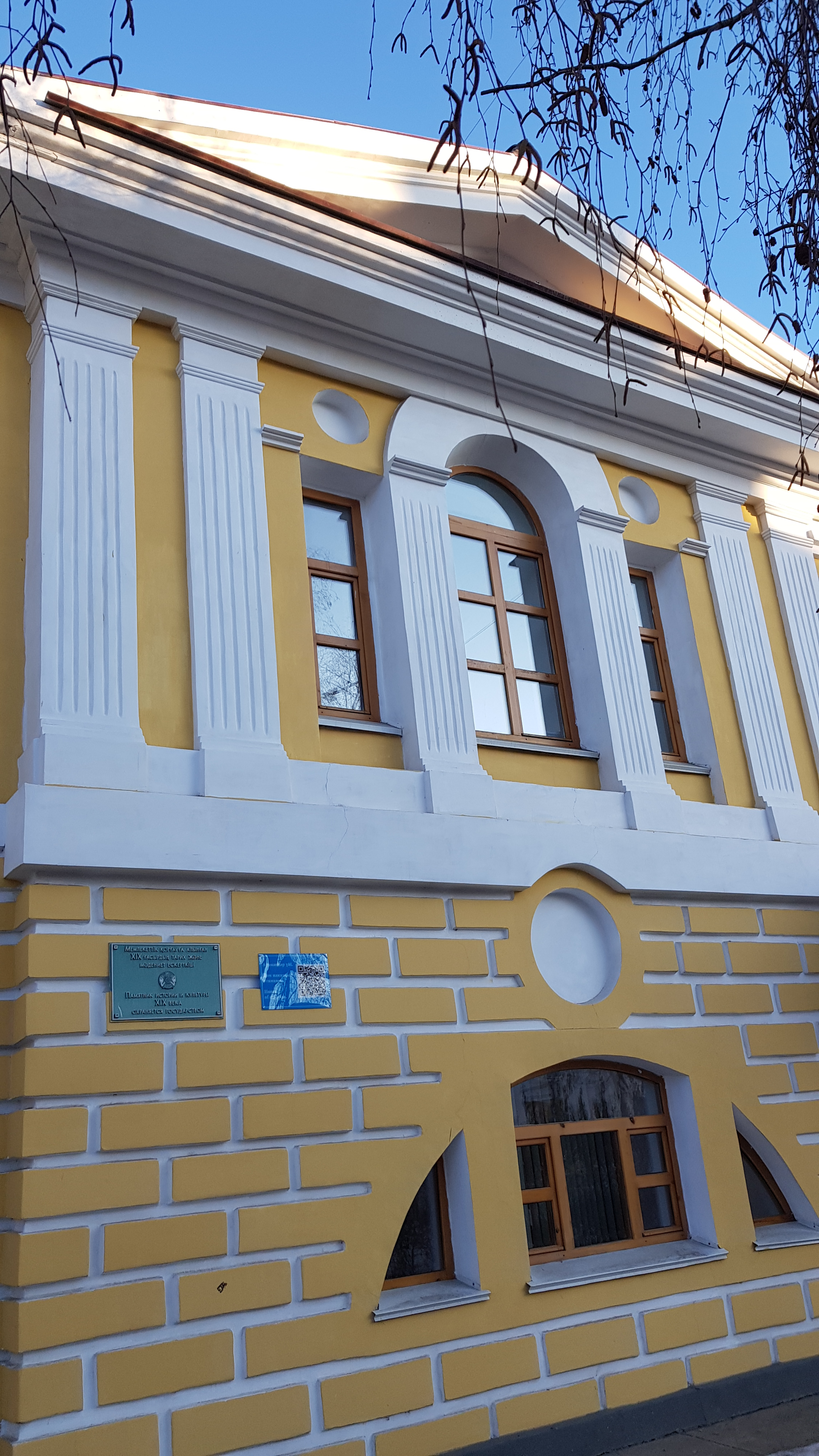 Правый ризалит Дома наказных атаманов в Уральске